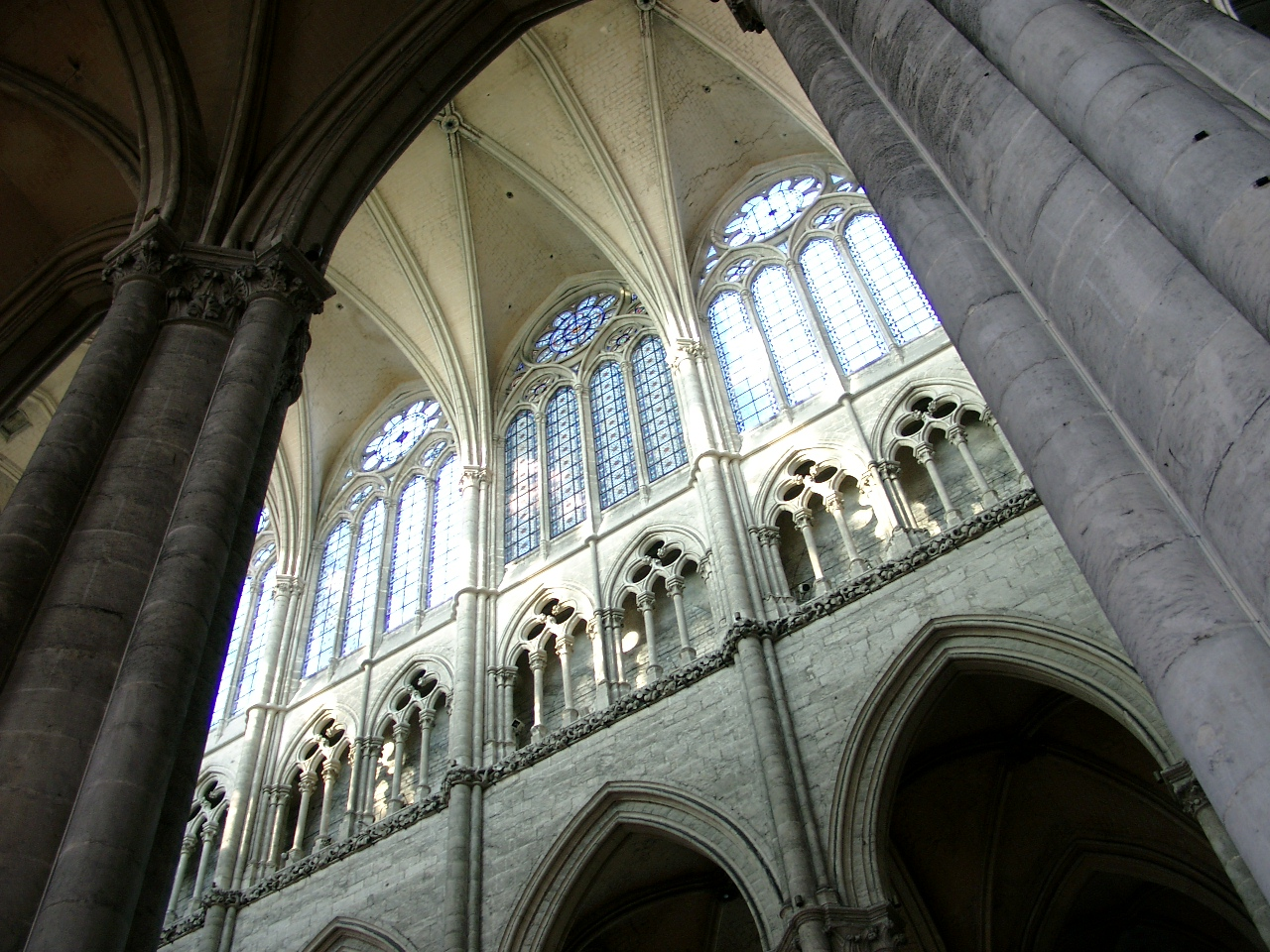 Voûtes quadripartites - détail - cathédrale d'Amiens